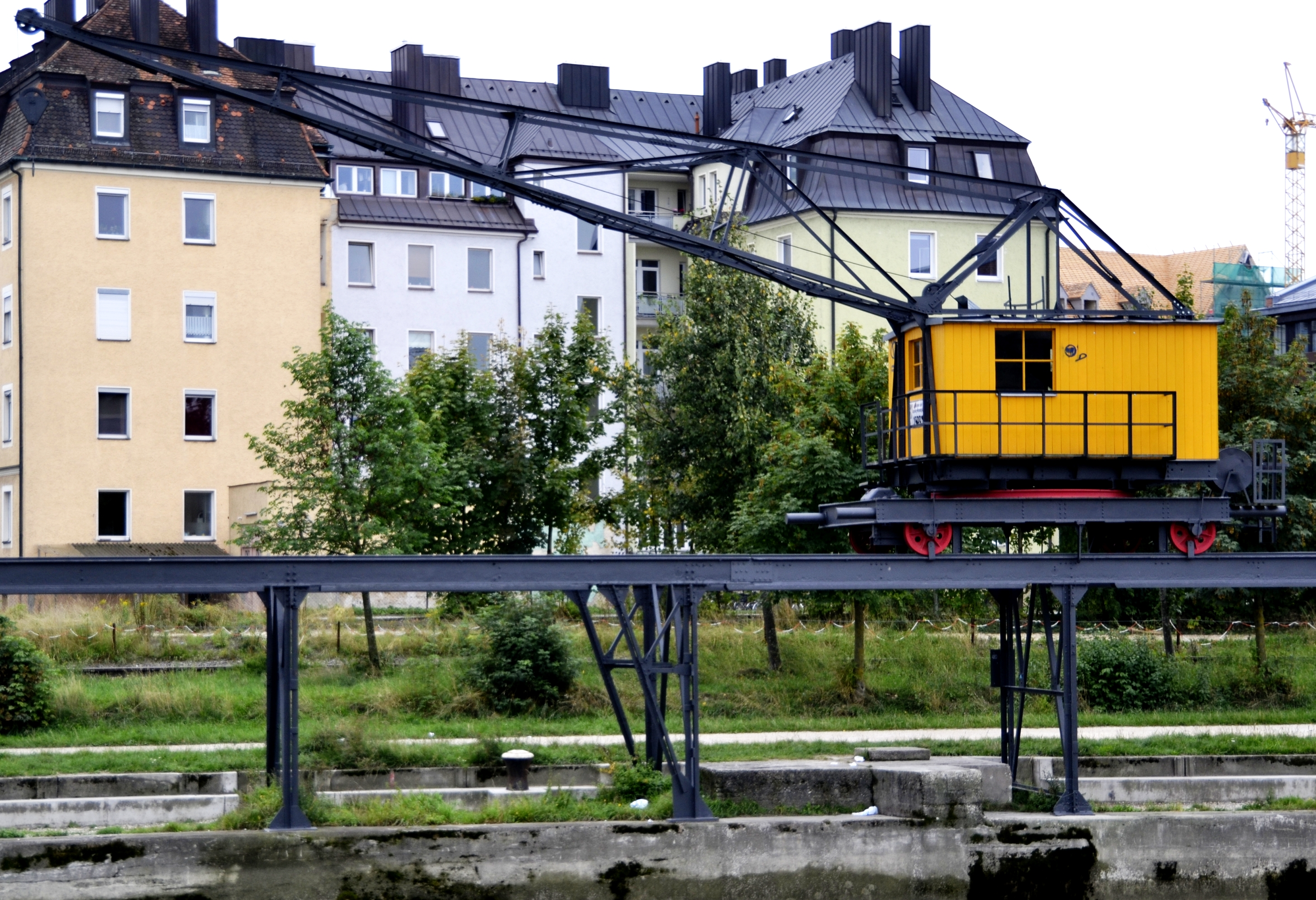 Alter Hafenkran an der Donaulände in Regensburg. Etwas westlich der Nibelungenbrücke